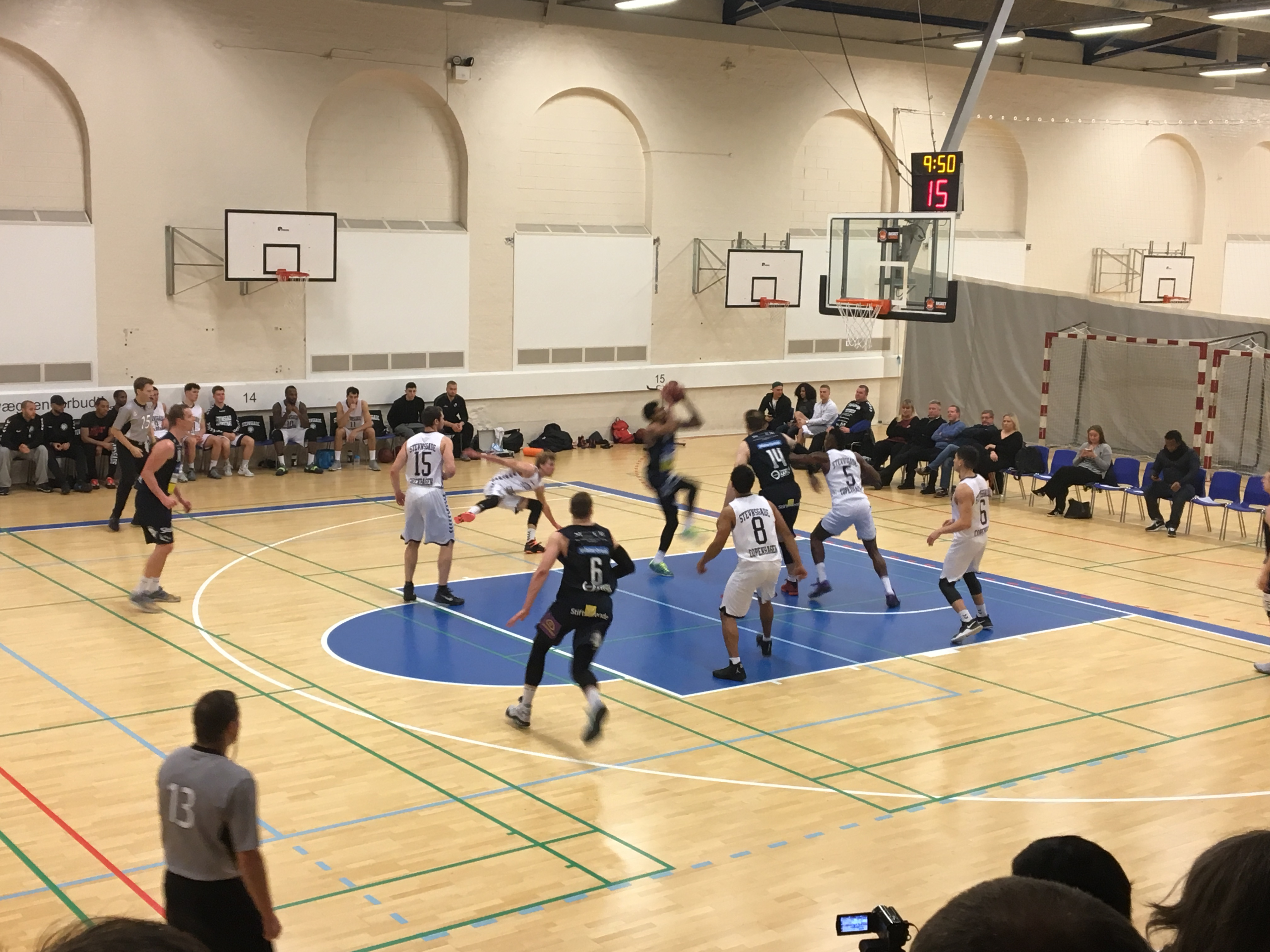 Stevnsgade mod Bakken Bears. Basketligaen 27. december 2016.